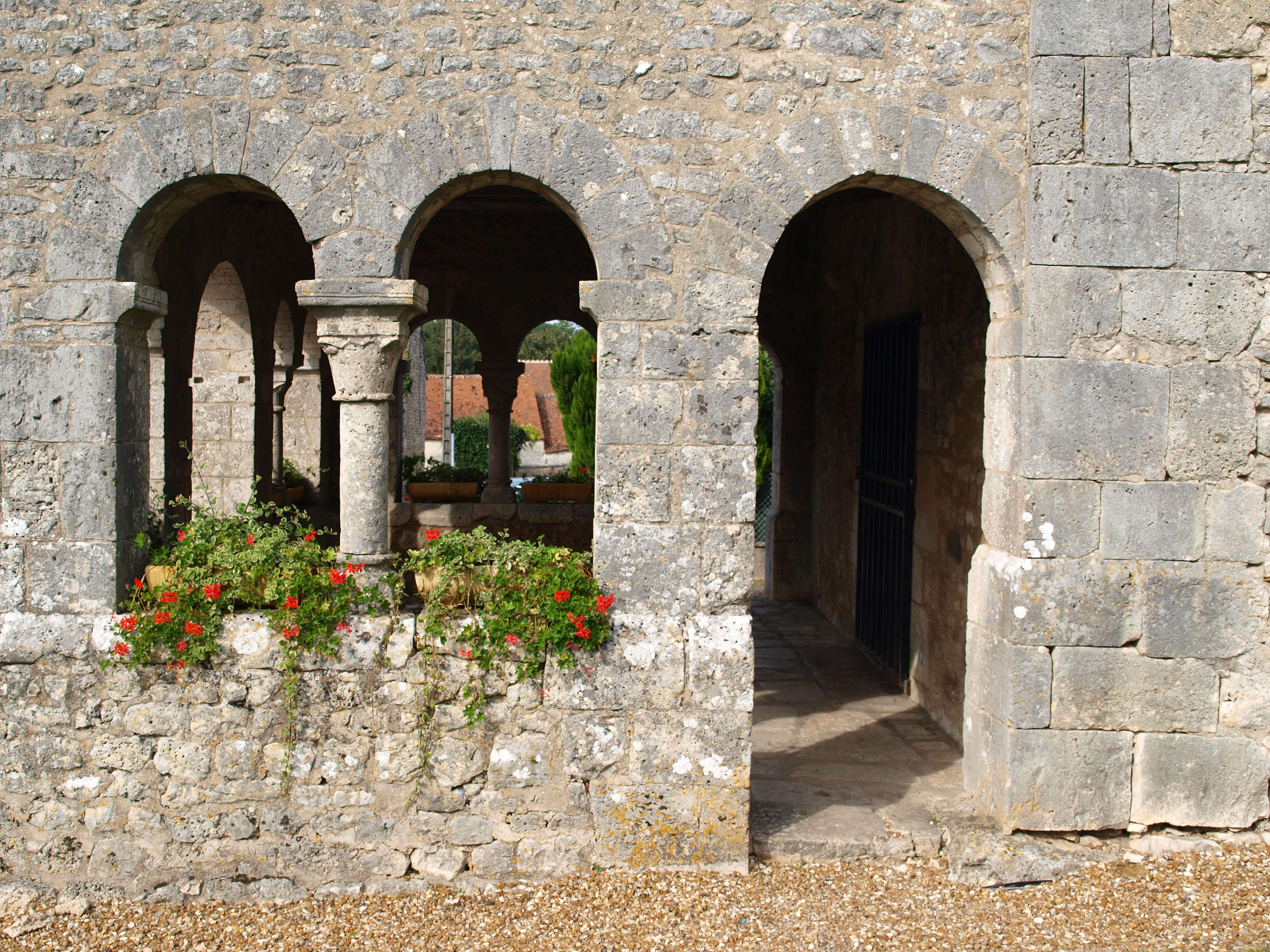 Préfontaines (Loiret, France) ; église. Côté du caquetoire.